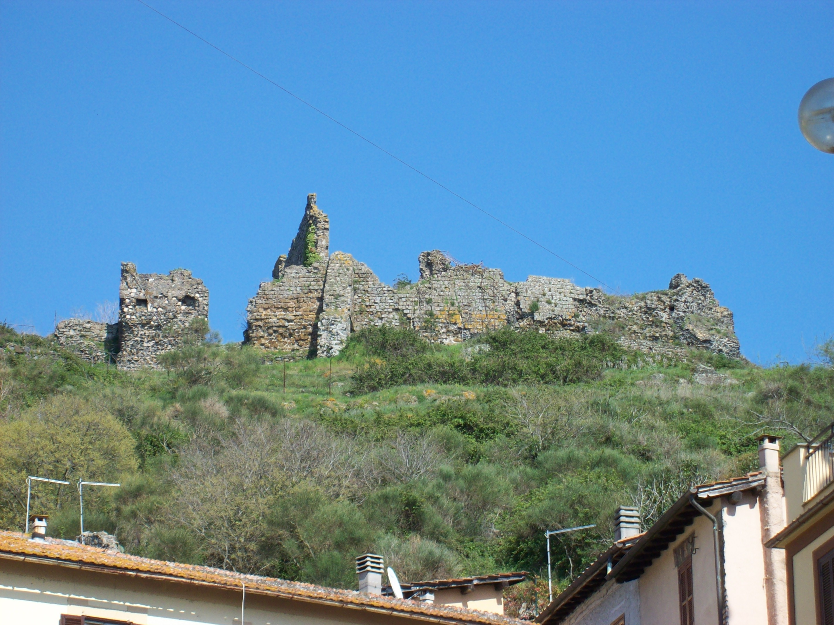 Castello (ca. XIII secolo) di Trevignano Romano (Roma), Italia